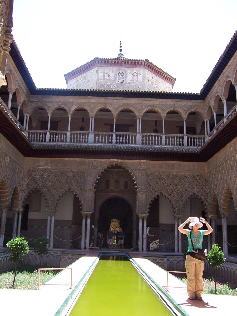 Alcázar de Sevilla camera: Kodak DX7440 Source: *Daniel Csorfoly